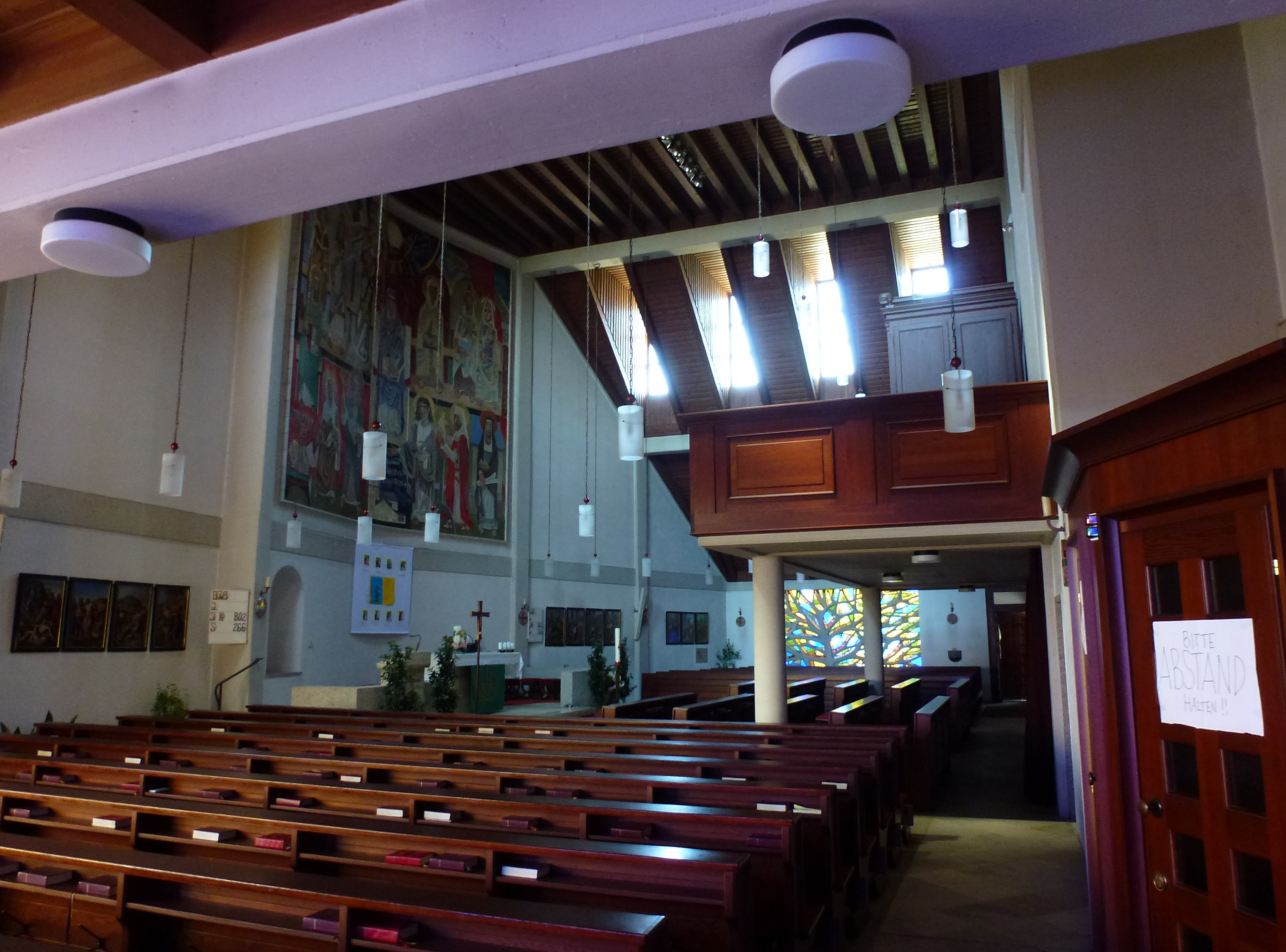 Kath. Pfarrkirche hl. Bartholomäus, Hochneukirchen